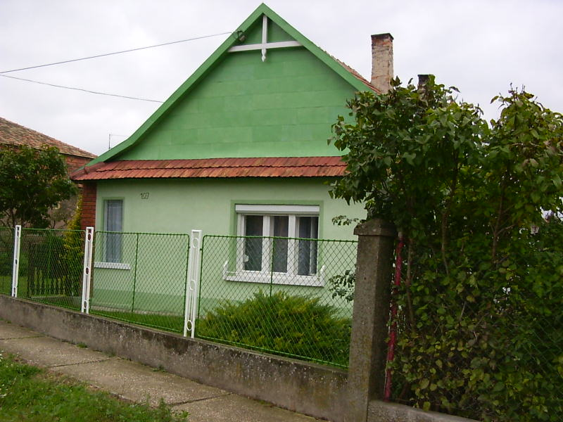 Tájjellegű felújított parasztház (Rétalap, Magyarország)